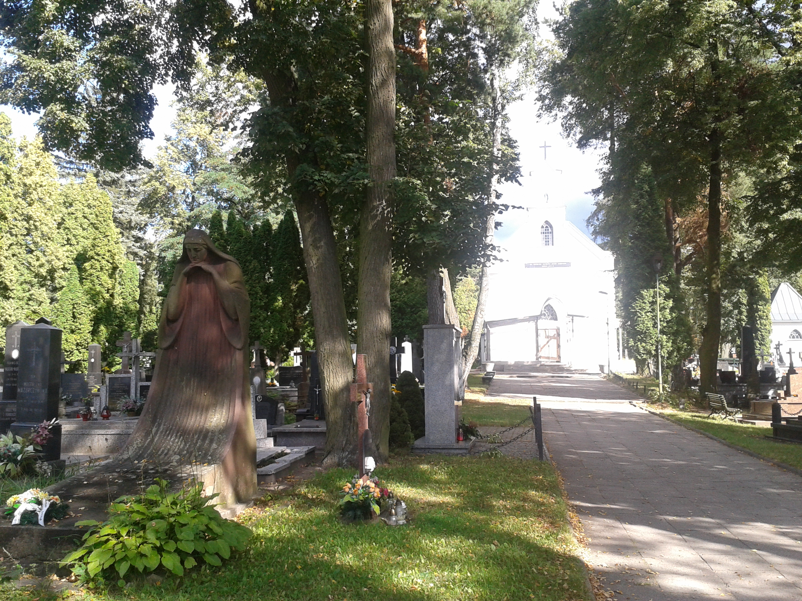 Białystok, Cmentarz katolicki - Farny